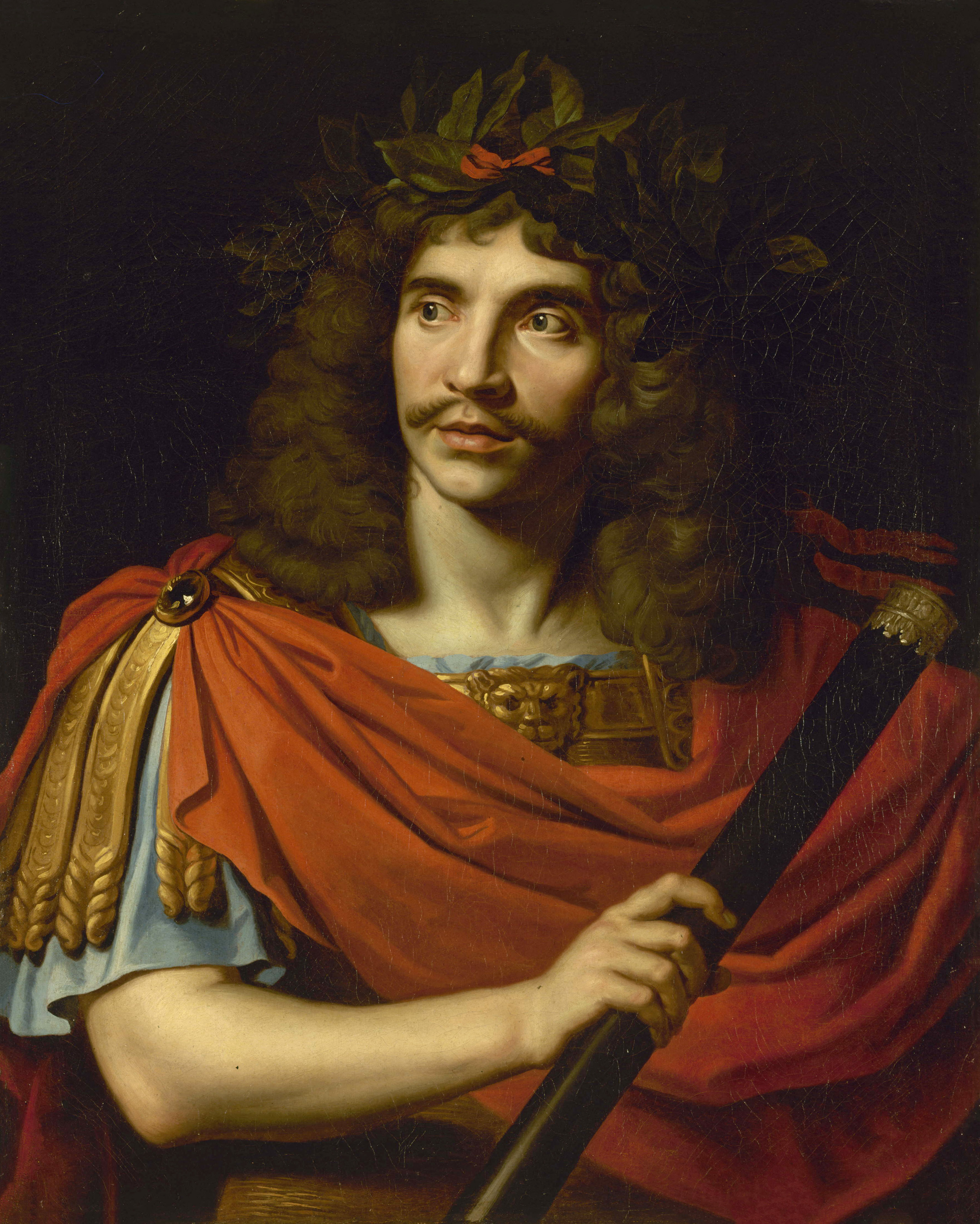 Molière dans le rôle de César dans La Mort de Pompée